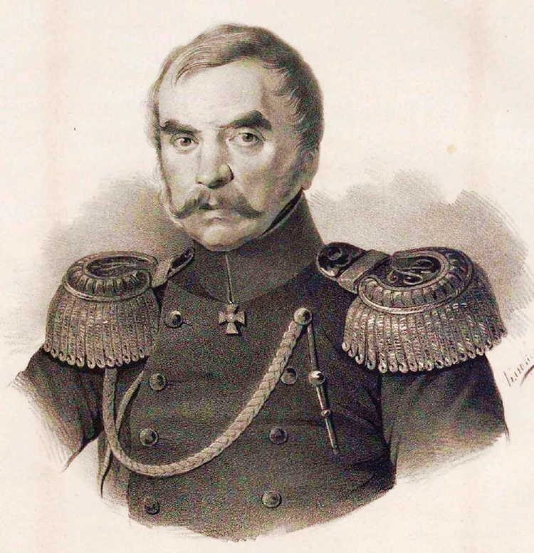 Васильчиков, Илларион Васильеви